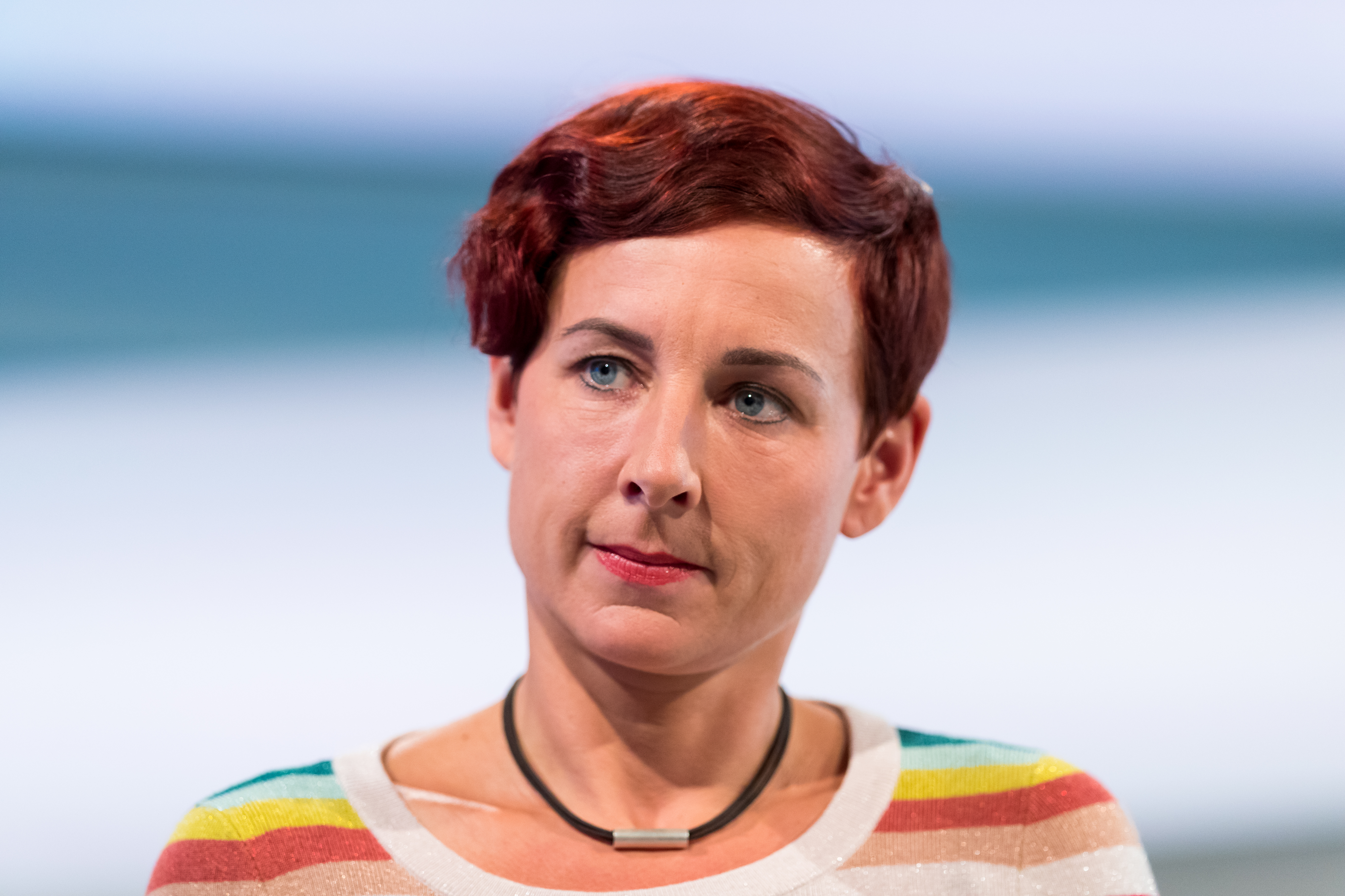 Juli Zeh during Frankfurter Buchmesse at Messe Frankfurt, Frankfurt, Hessen, Germany on 2018-10-13, Photo